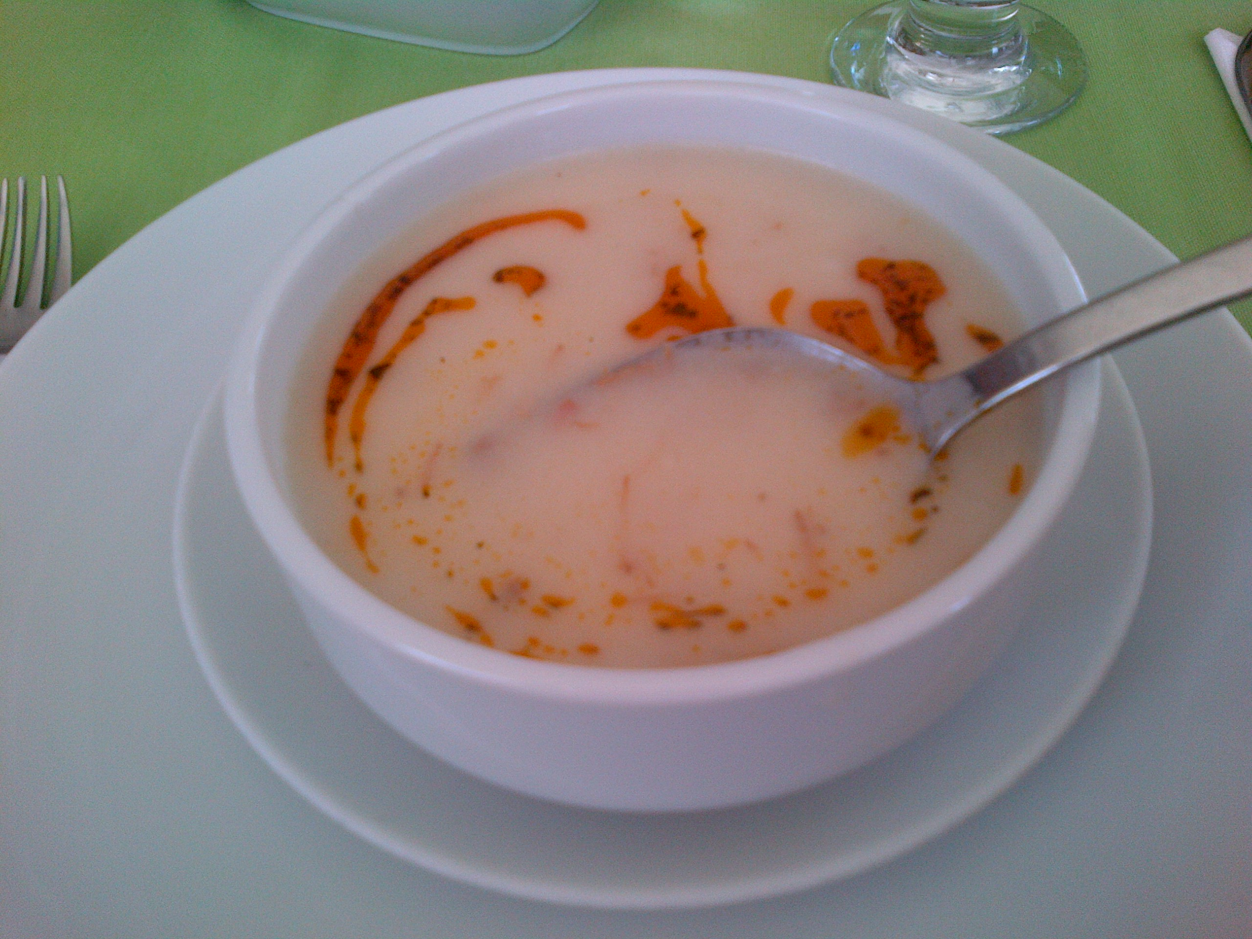 "Düğün çorbası" o "sopa de bodas", de la cocina turca.